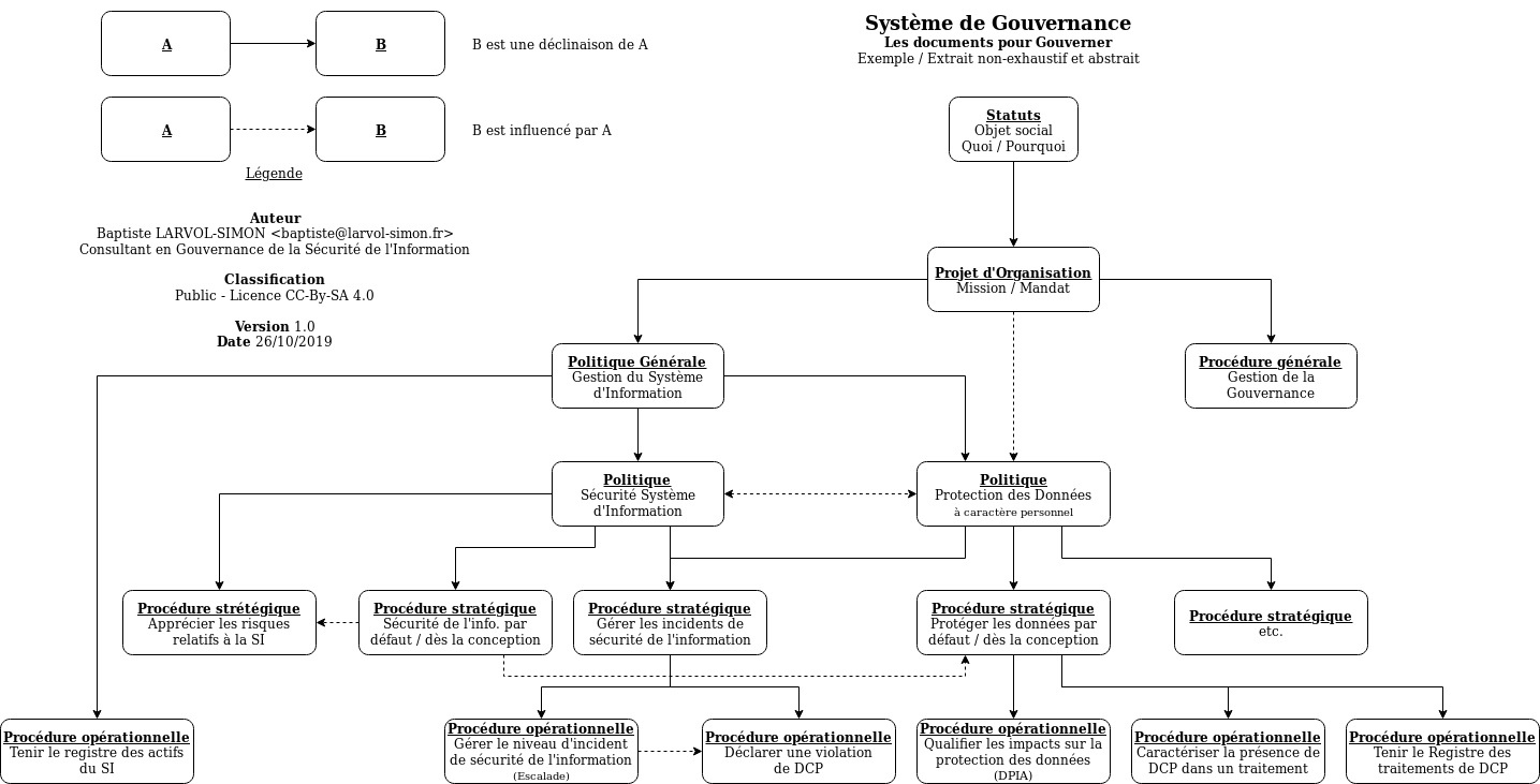 Les documents pour gouverner